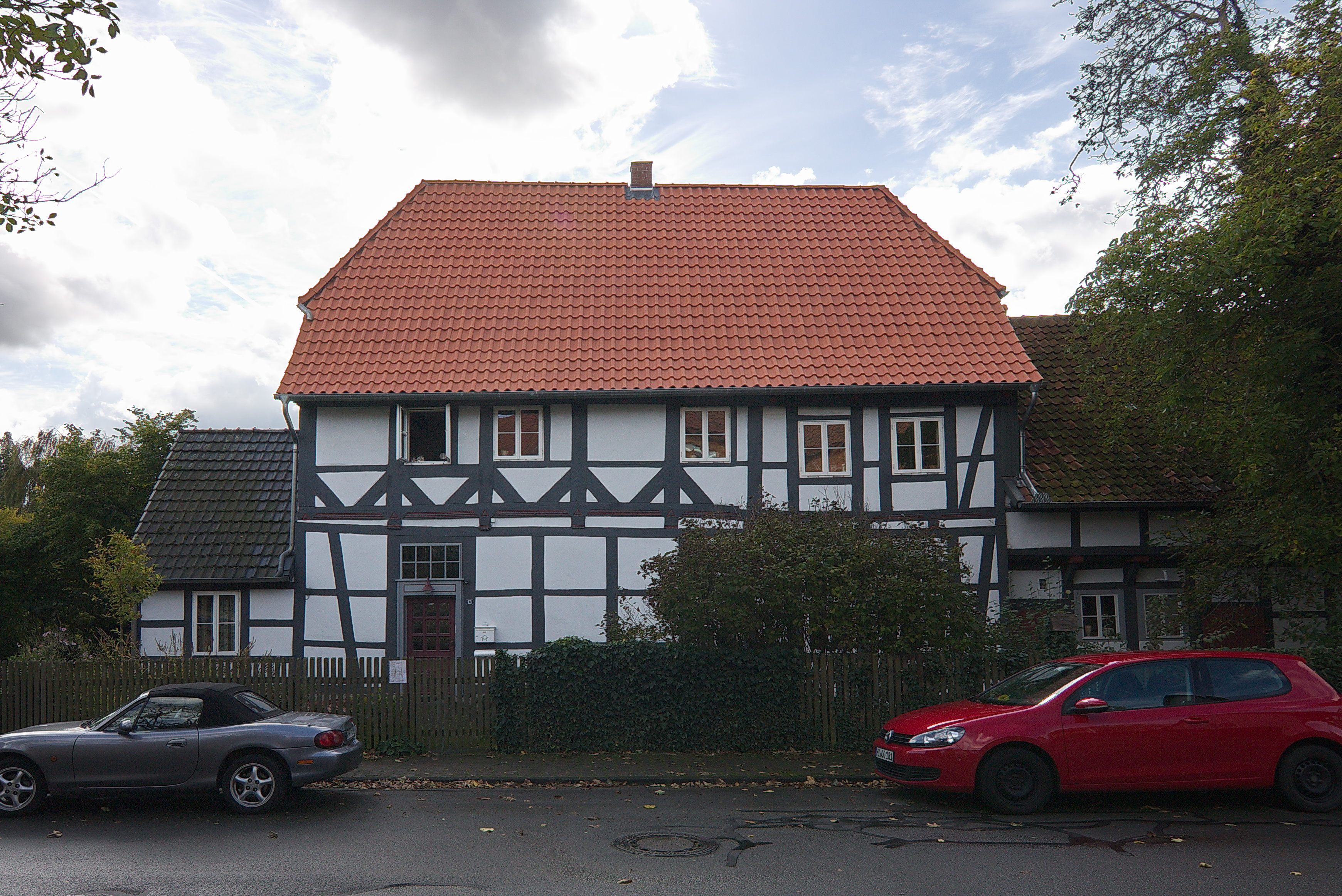 Denkmal in Eldagsen (Springe), Niedersachsen, Deutschland